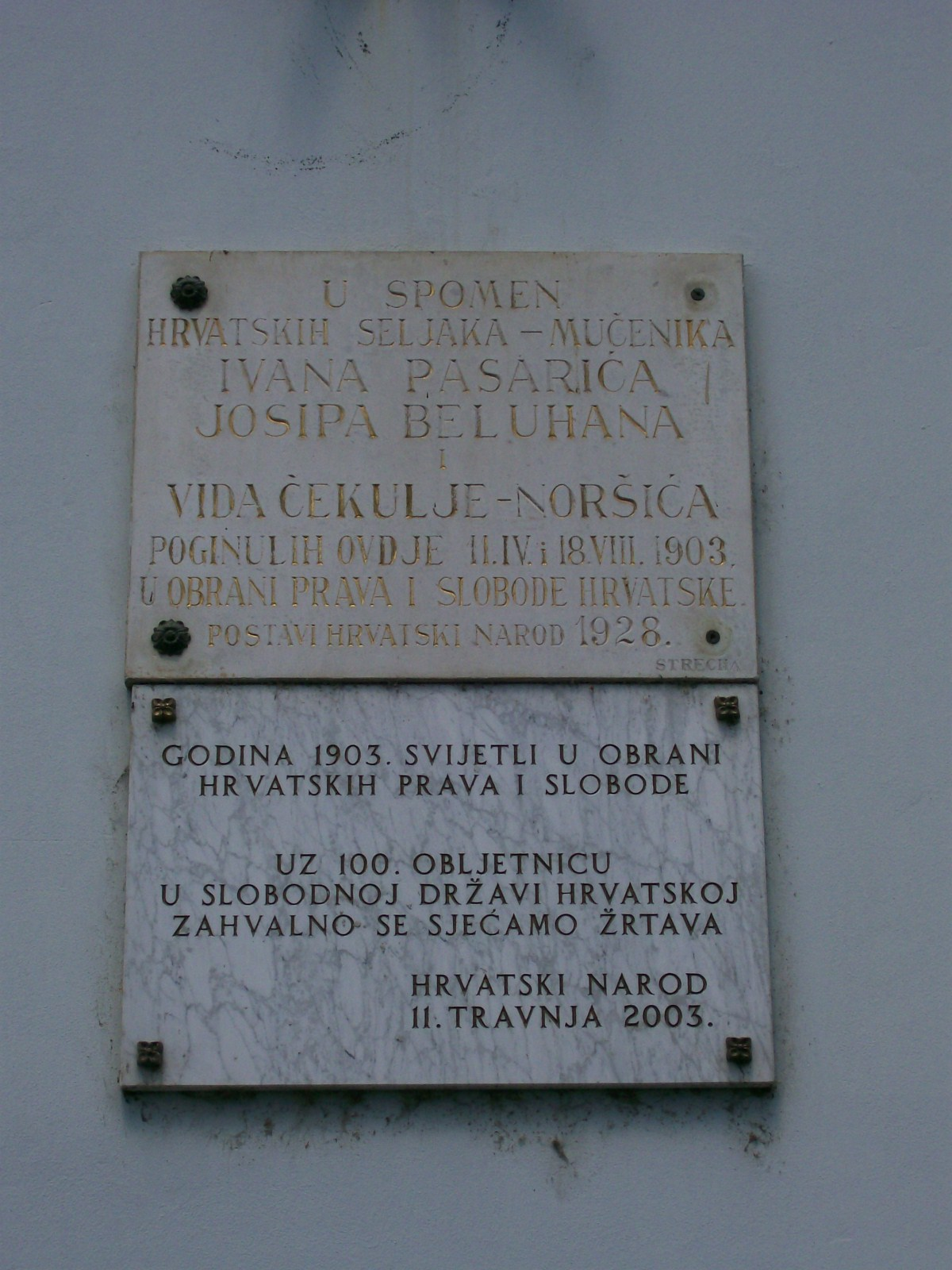 Spomen ploča u Zaprešiću na željezničkom kolodovoru poginulima 1903.